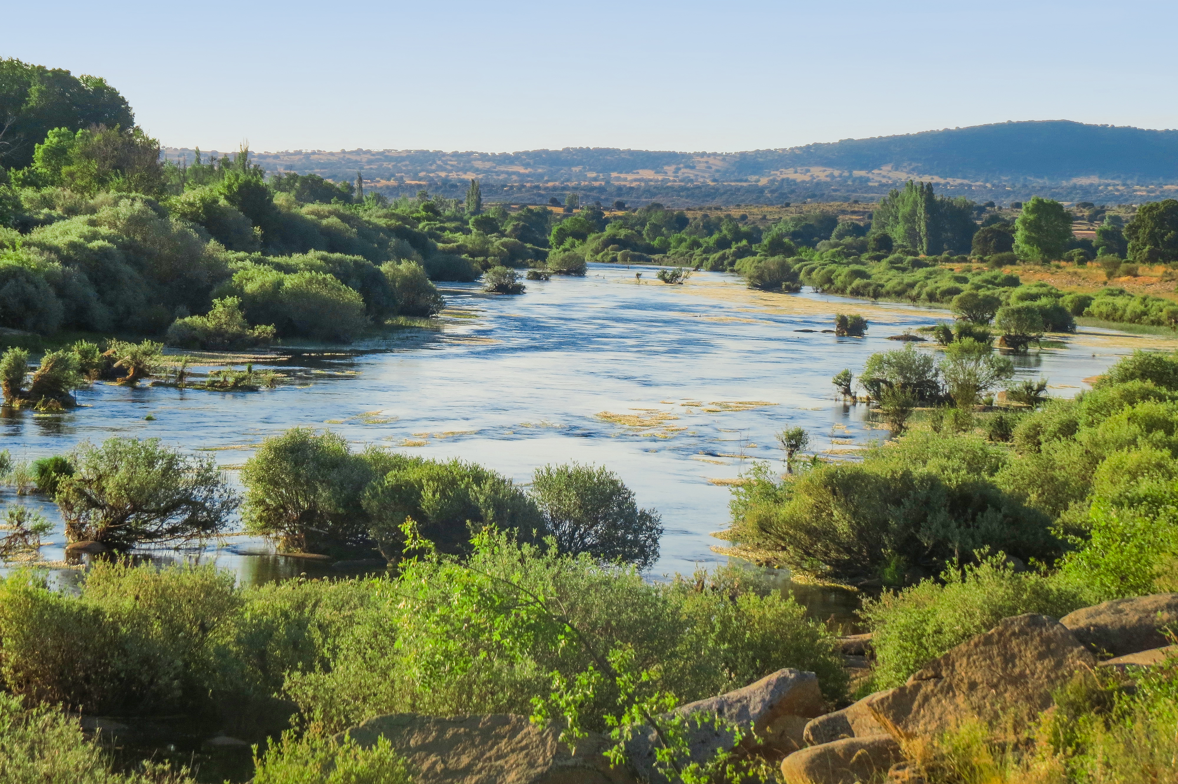 Riberas del río Tormes y afluentes